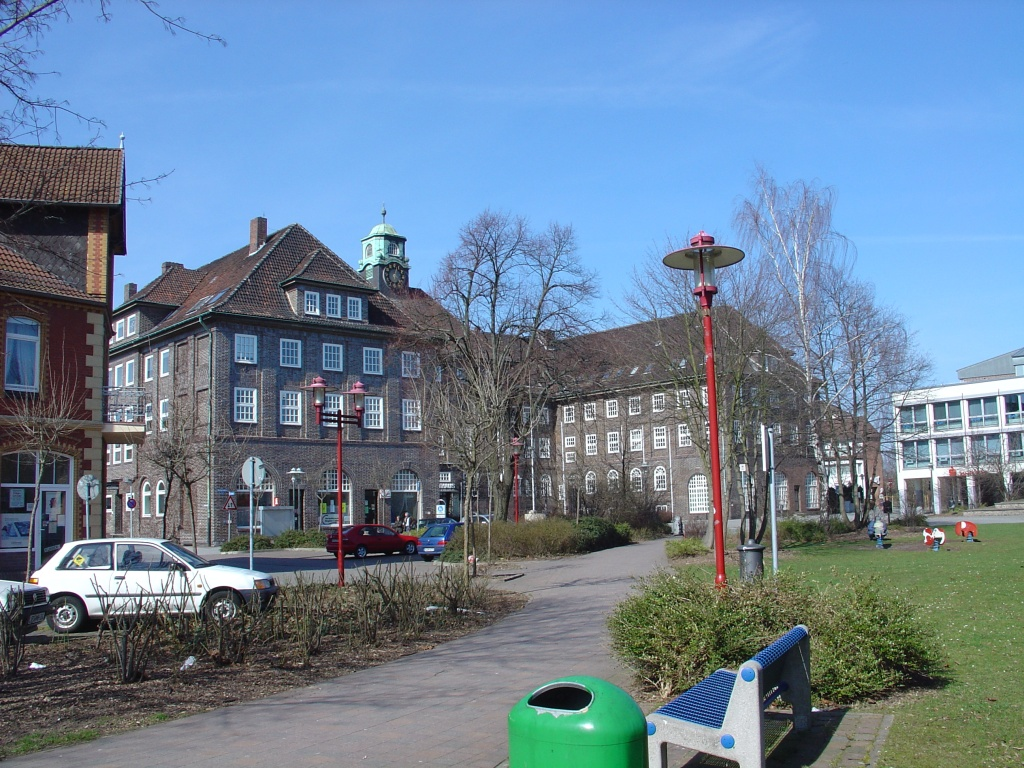 Beschreibung: Rathaus in Lehrte Quelle: selbst fotografiert, März 2005 Fotograf oder Zeichner: Silberchen 21:39, 13. April 2005 (CEST) 18:15, 21. März 2005 Silberchen 1024 × 768 (375.231 Byte) (Rathaus in Lehrte)